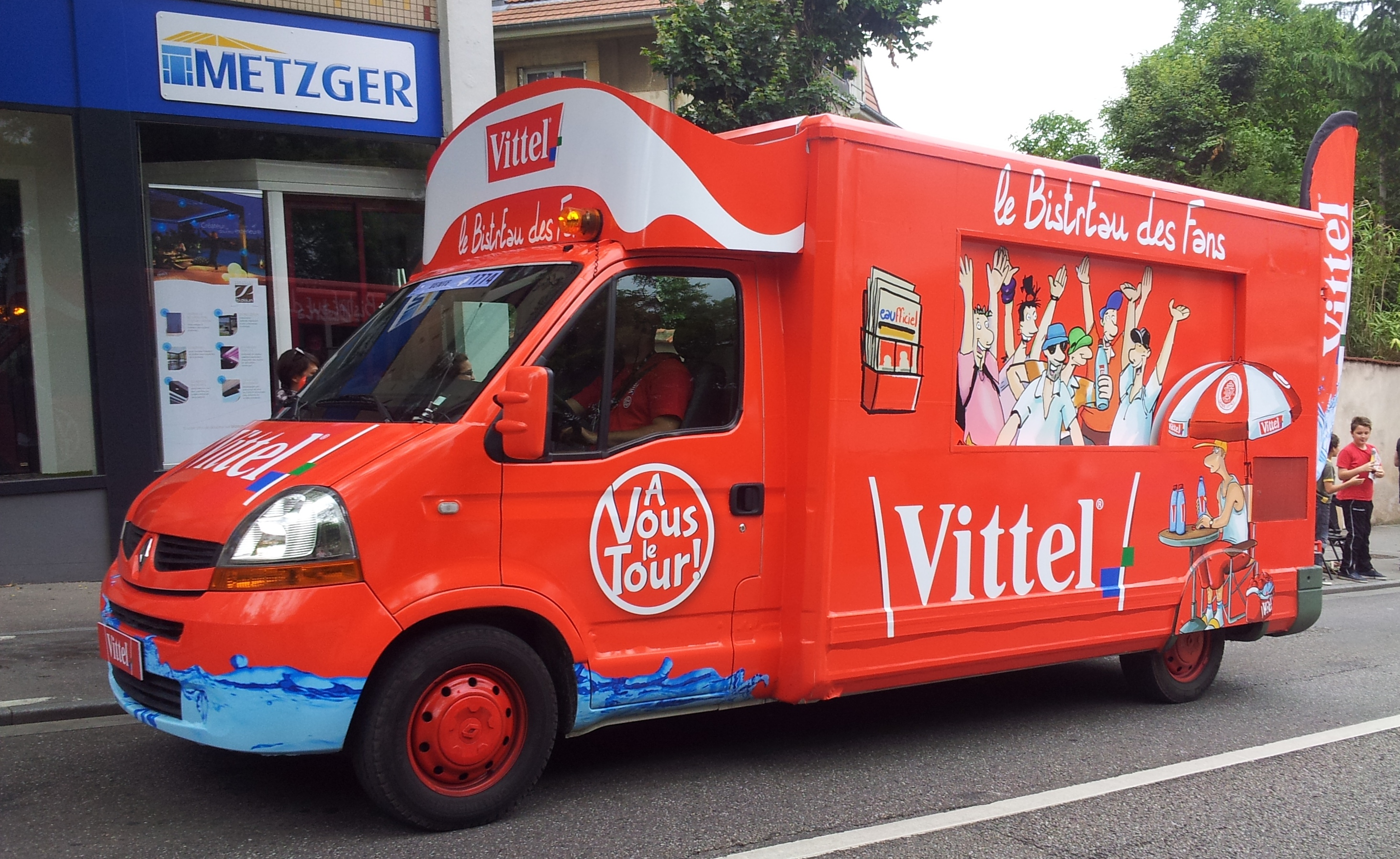 Véhicule de la caravane du Tour de France 2014 dans la côte de Boufflers à Nancy (7e étape).